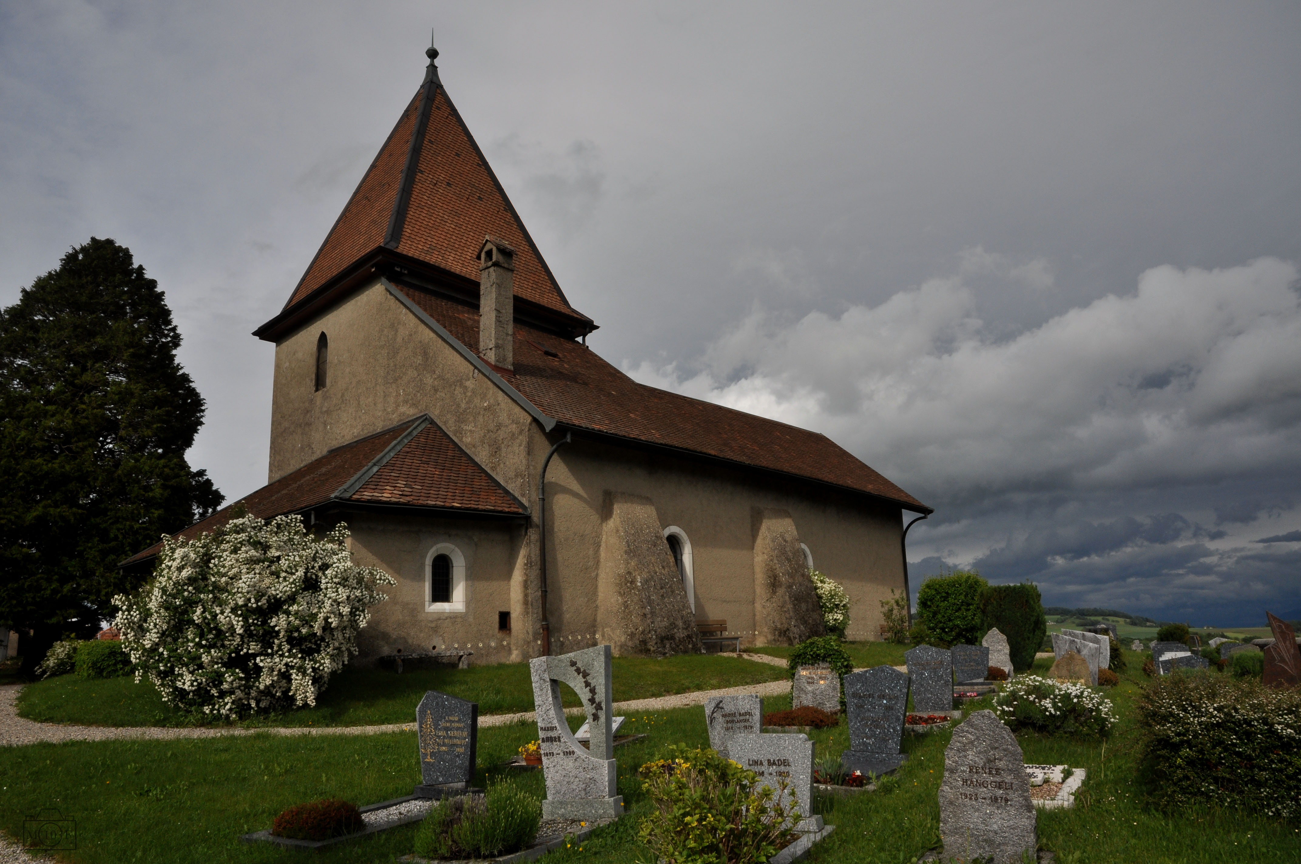 Kirche Notre-Dame, Bassins, Waadt